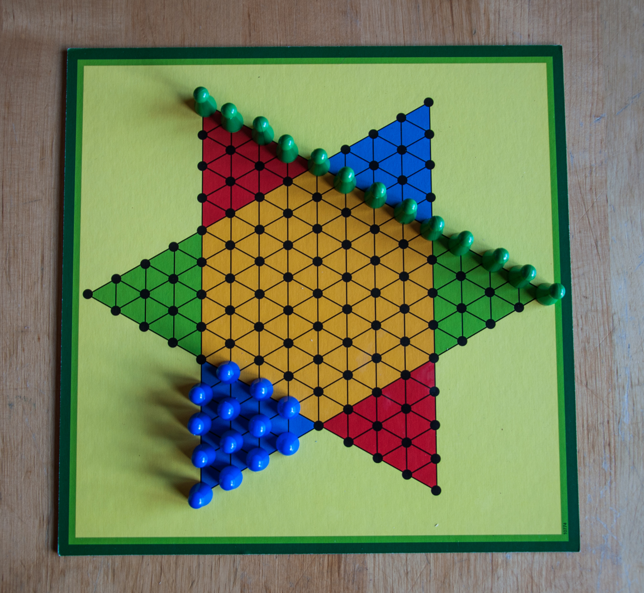 Sternhalma, Spielvariante Connection